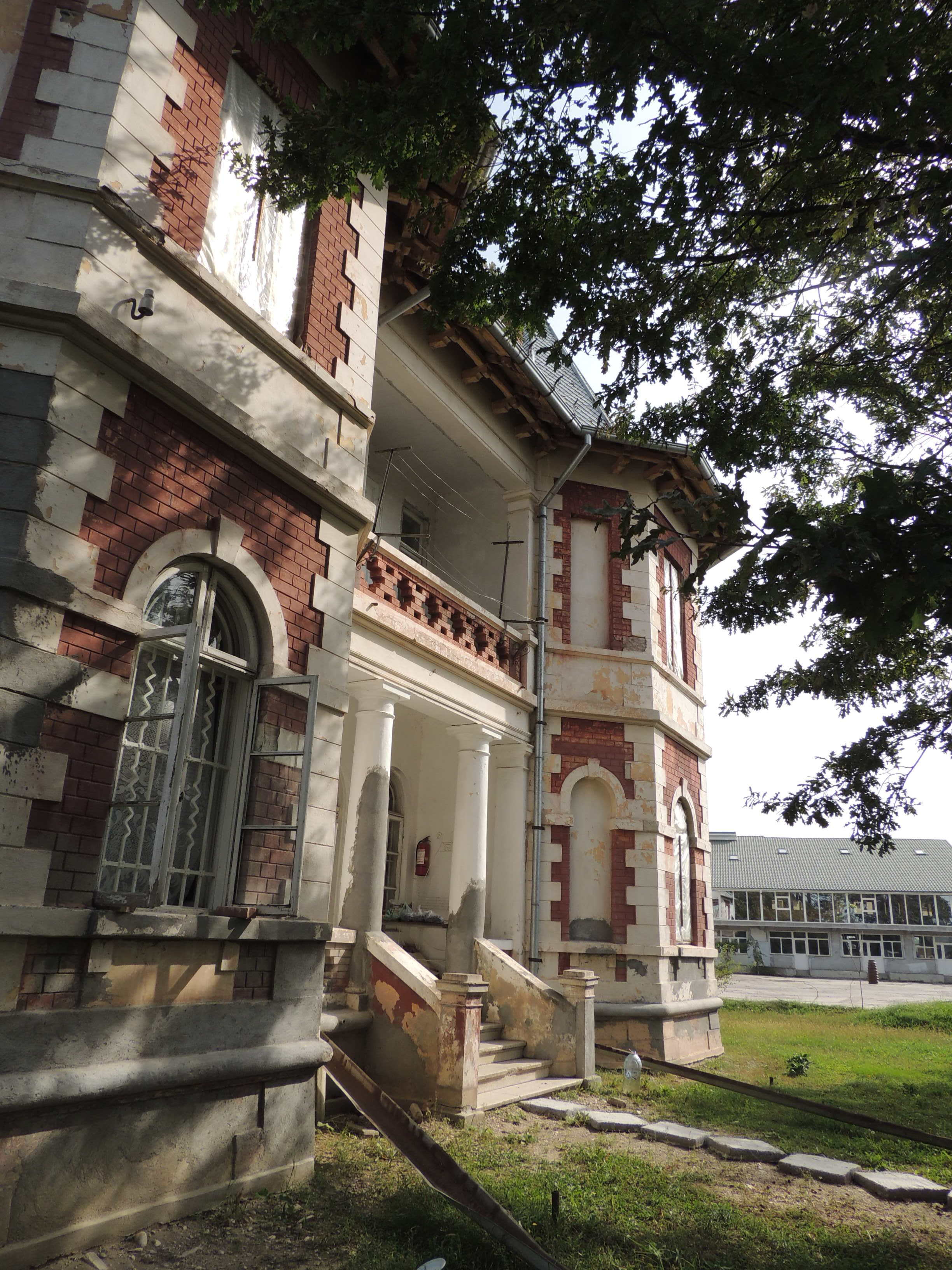 Acces principal